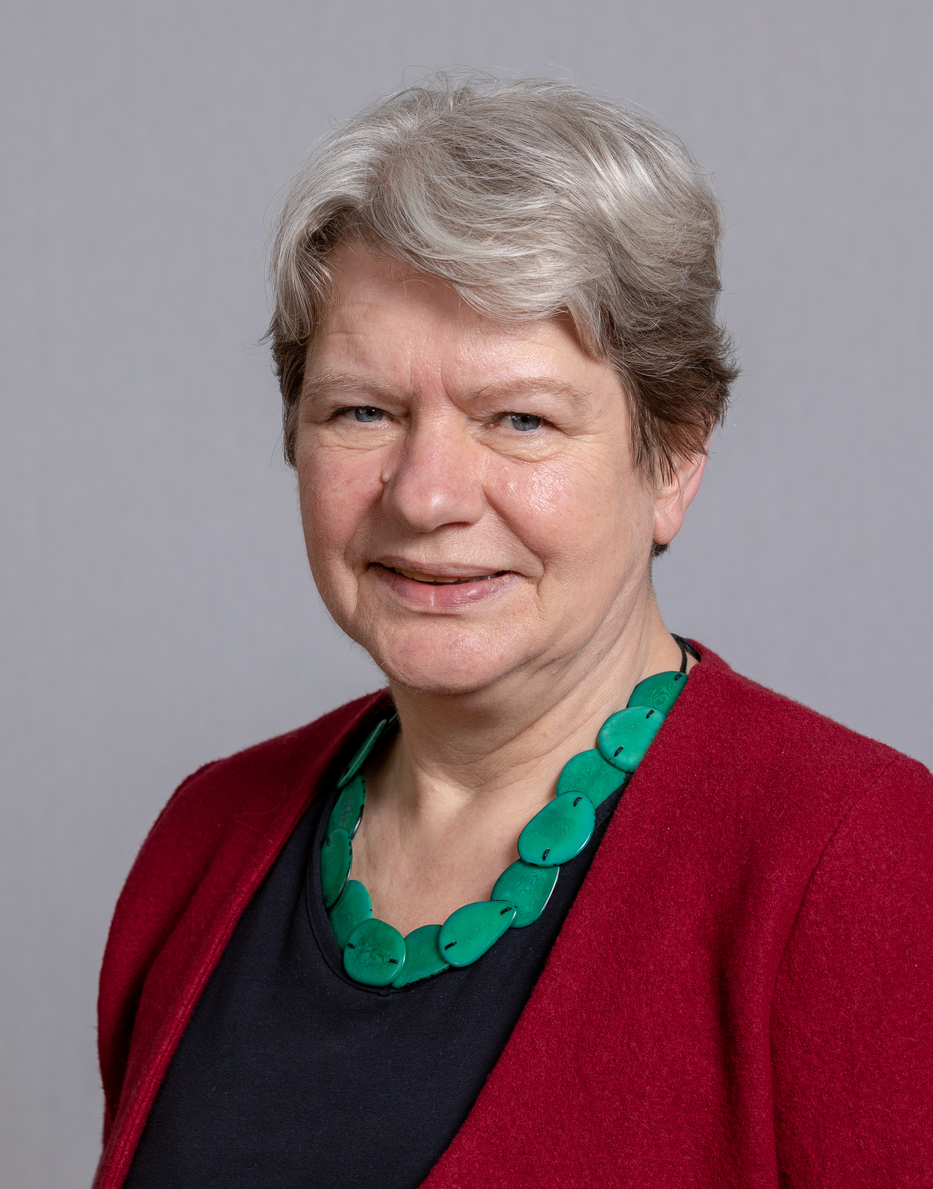 Beatrix Tappeser im Hessischen Landtag